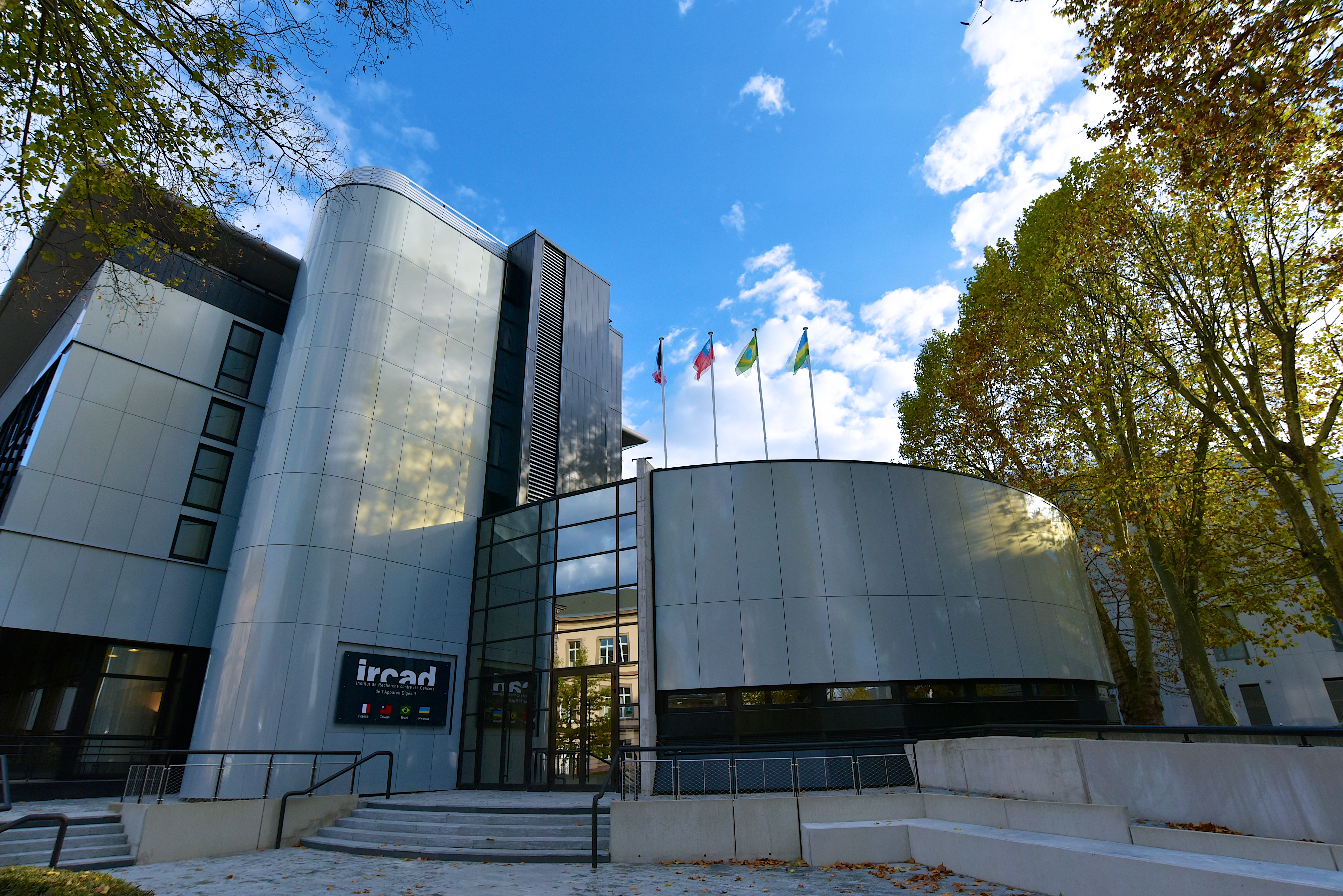 Entrée du bâtiment IRCAD